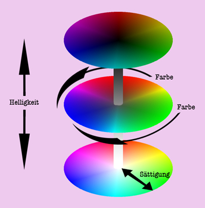 Jede Farbe lässt sich durch diese 3 Zustände beschreiben.